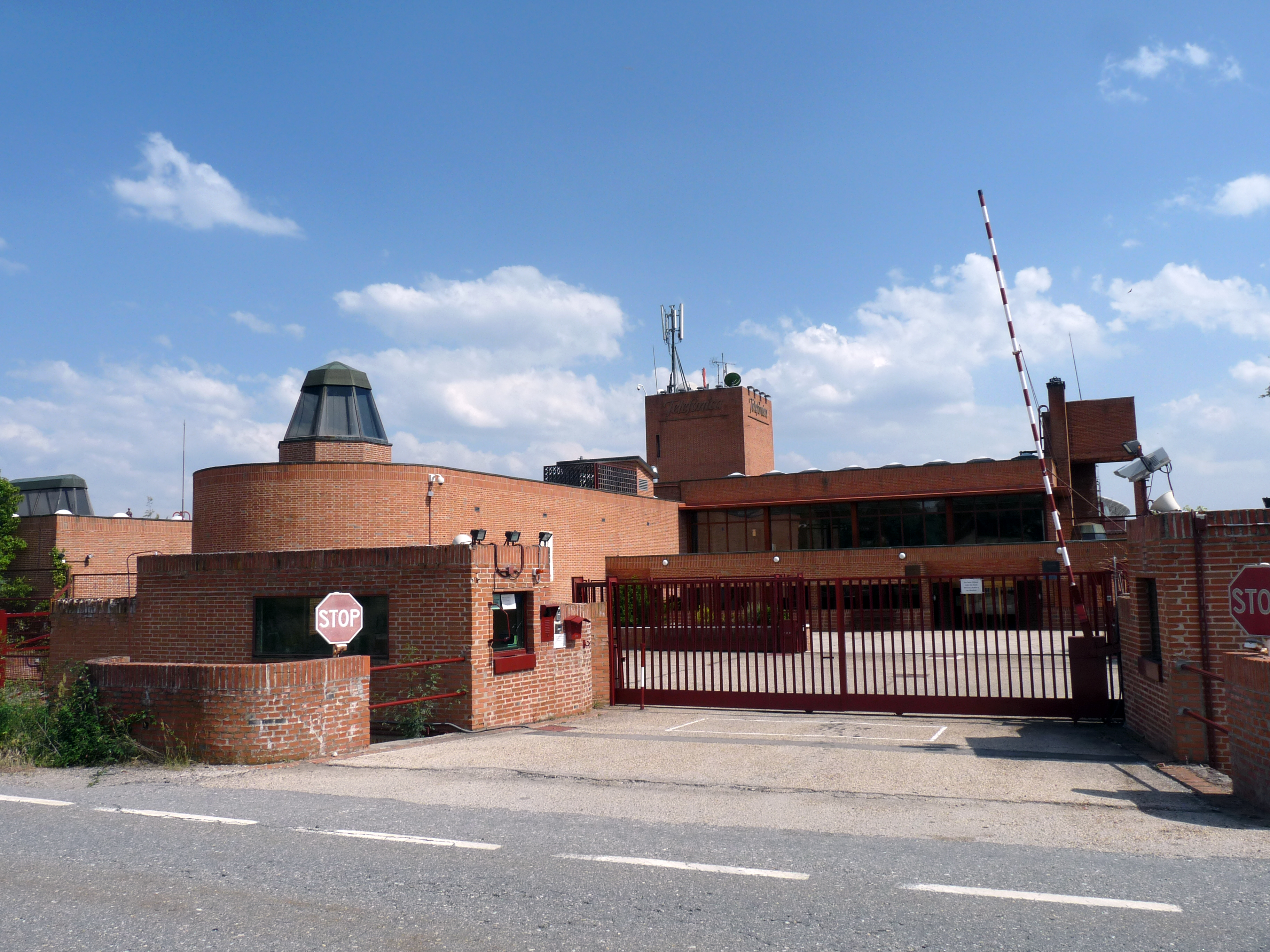 Estación de comunicaciones por satélite de Buitrago del Lozoya, Comunidad de Madrid, España.